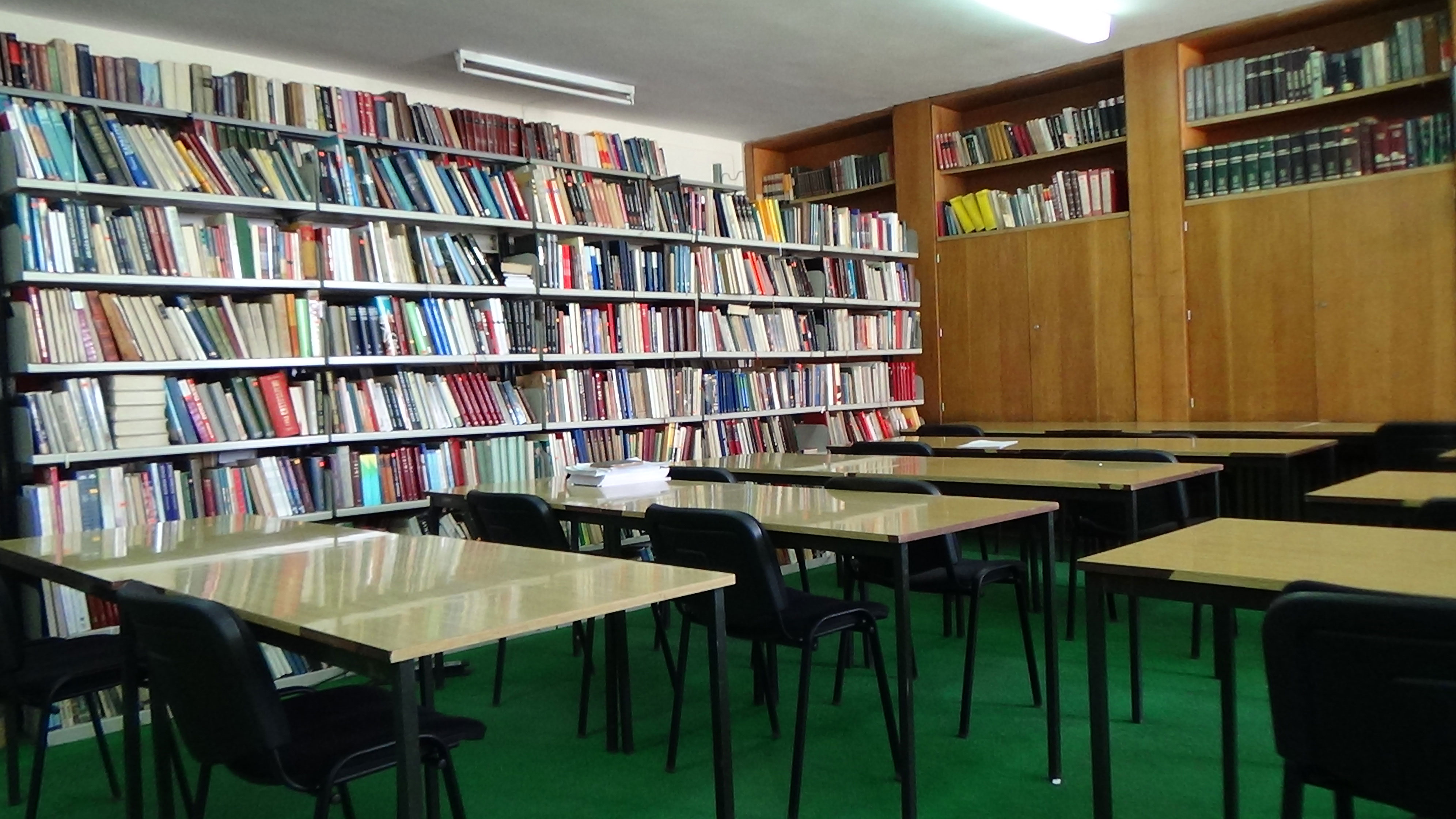 Čitaonica biblioteke Kruševac.